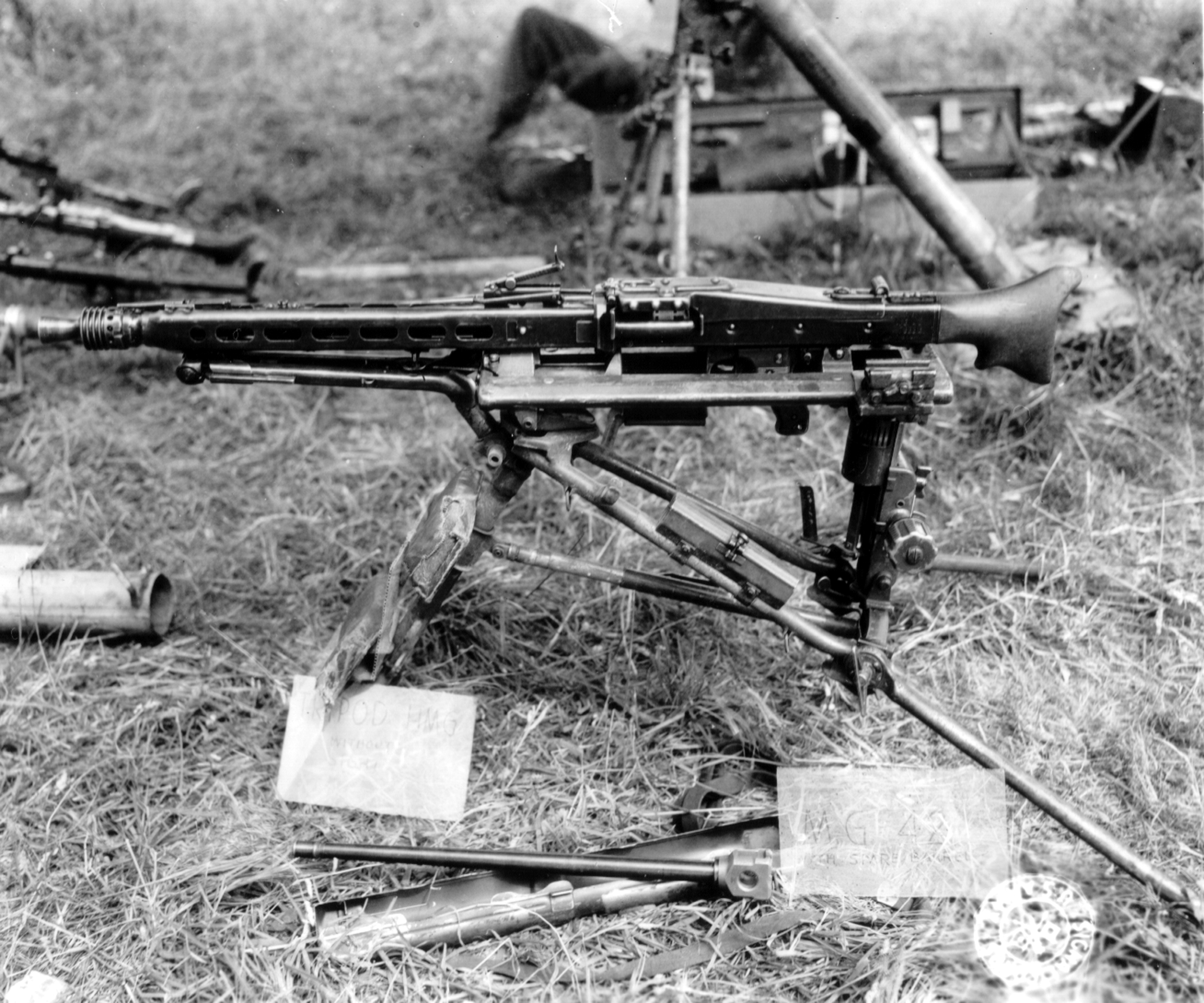 Libération de la Basse-Normandie pendant l'été 1944, en secteur américain. Prise de guerre : des mitrailleuses allemandes MG42 avec leur canons interchangeables au premier plan.